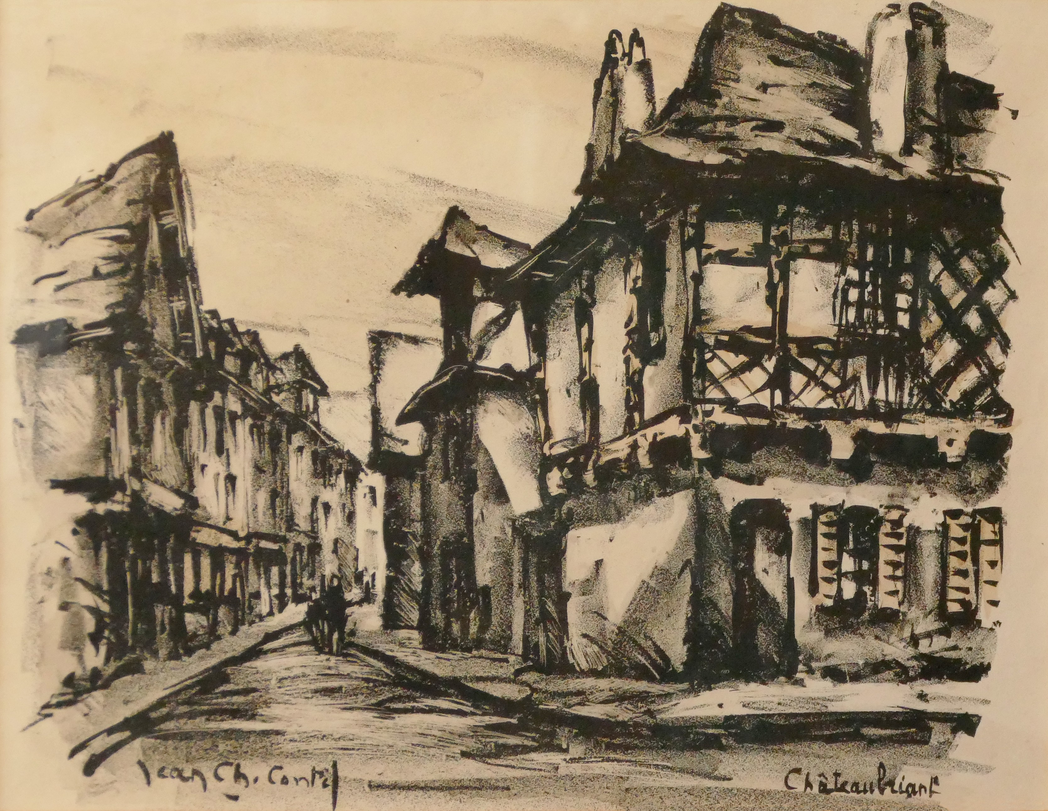 Châteaubriant, maisons à pan de bois lithographie par Jean-Charles Contel (1895-1928), environ 30 x 40 cm. Collection particulière.